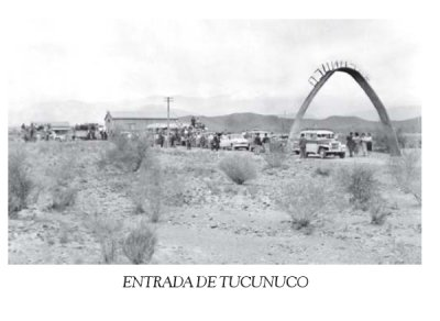 Tucunuco. 1955